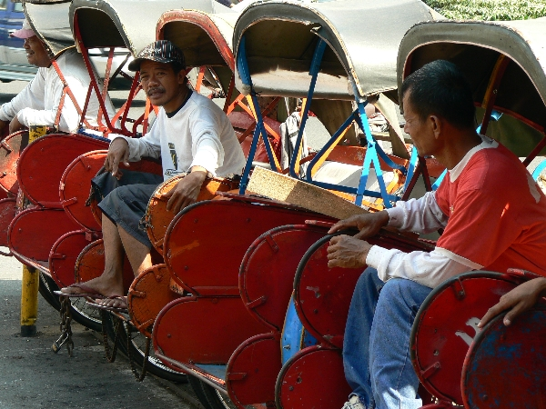 Typical bedjaks of Surakarta (Indonesia 2009)